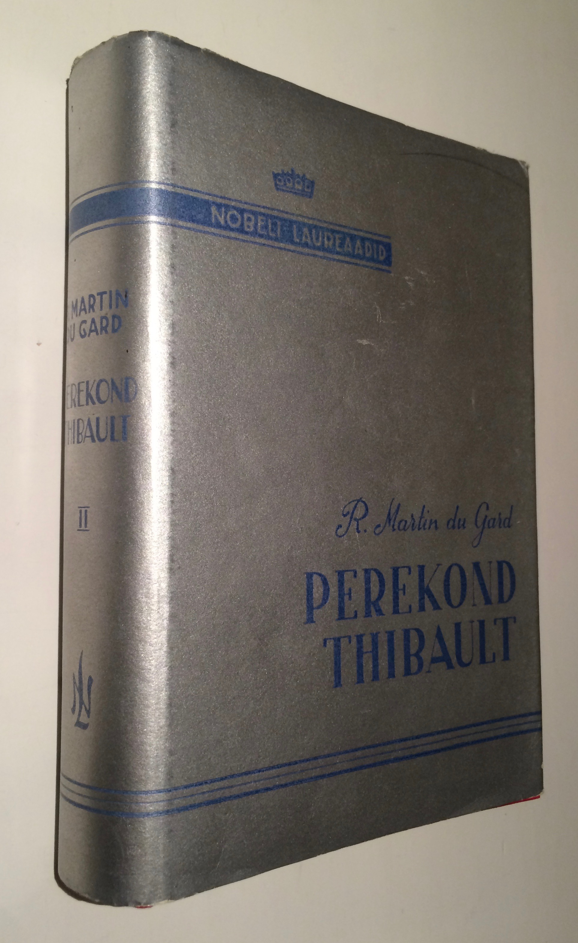 Ed. Salu poolt kujundatud ümbrispaber